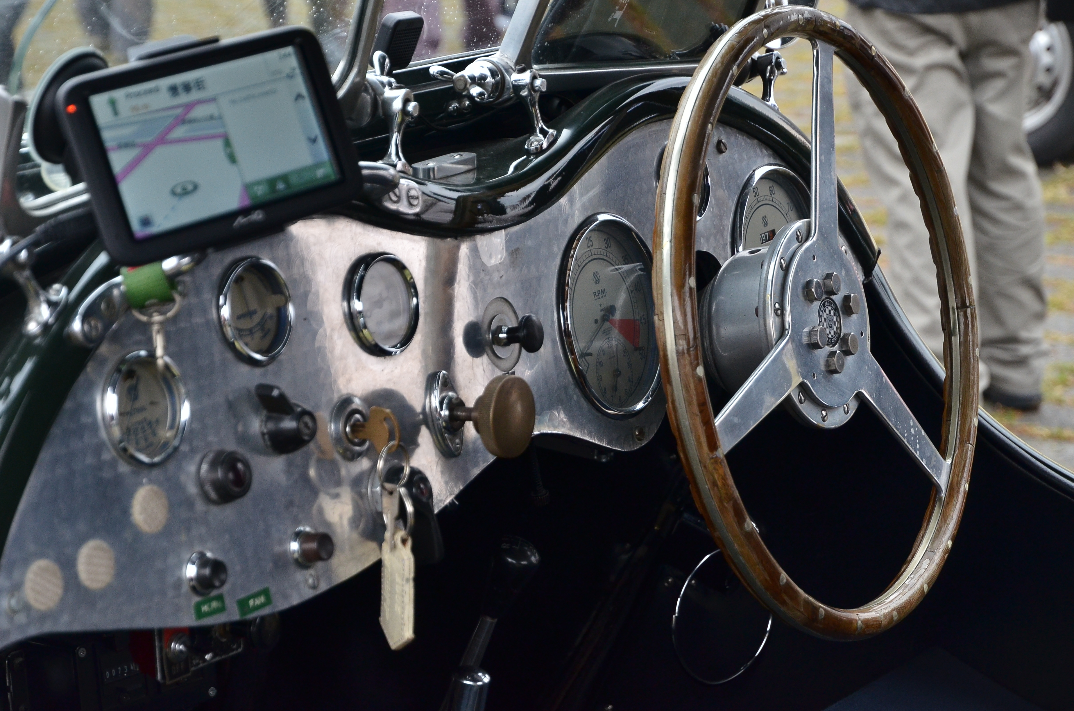 1936 SS100 Jaguar